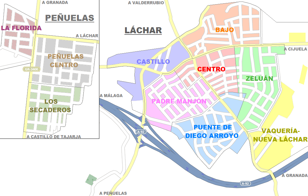 Barrios de Láchar (con los núcleos de Láchar y Peñuelas), en la provincia de Granada (España)